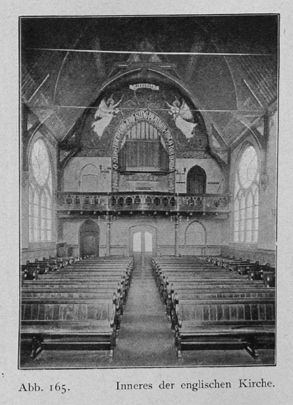 Christ Church, im Garten des englischen Generalkonsulats an der Prinz-Georg-Straße in Düsseldorf-Pempelfort, erbaut 1897 bis 1899, Architekt August Zögen, Abb._165_Inneres_der_englischen_Kirche.jpg